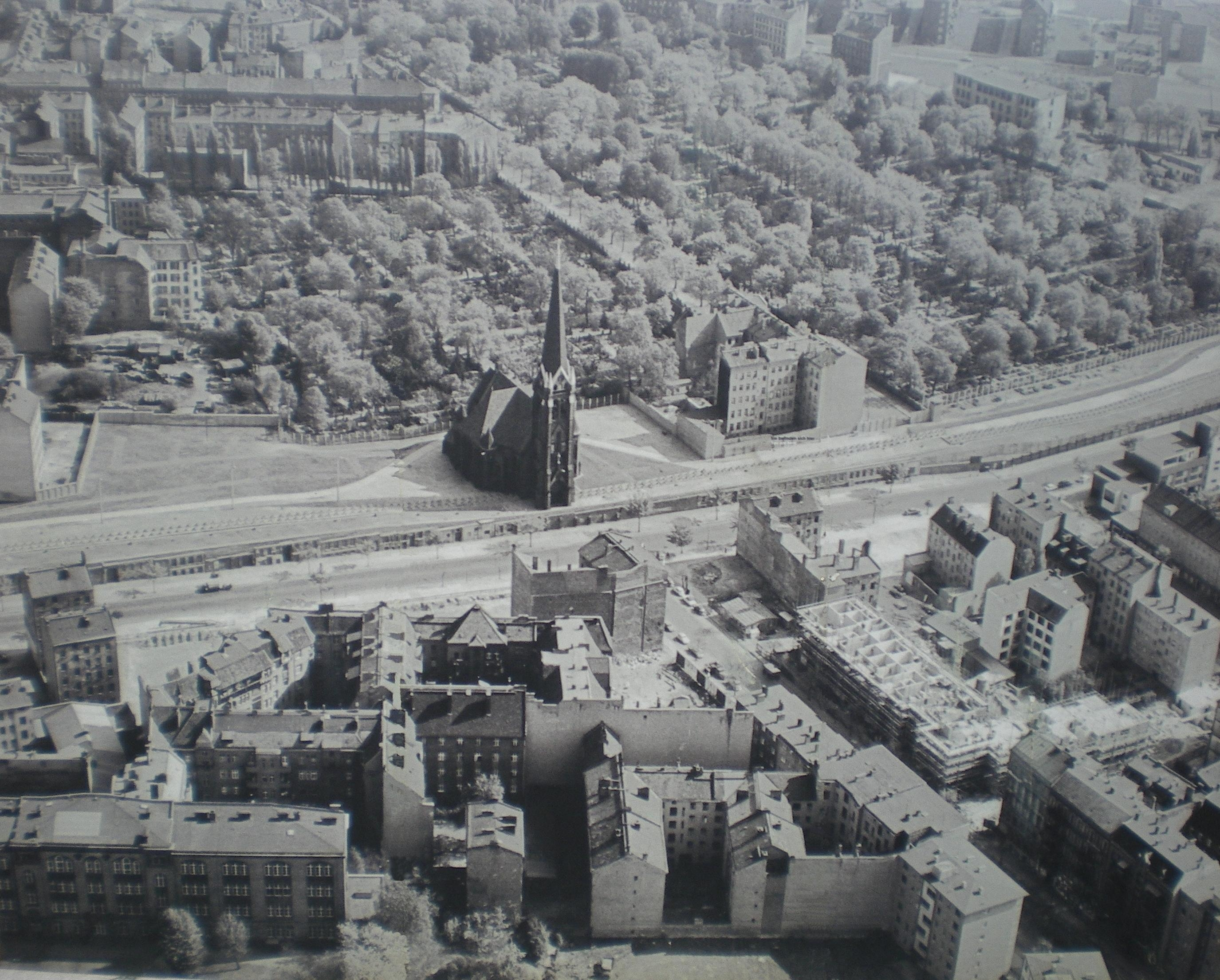 Bernauer Straße, Berlin. Luftbild um 1970.